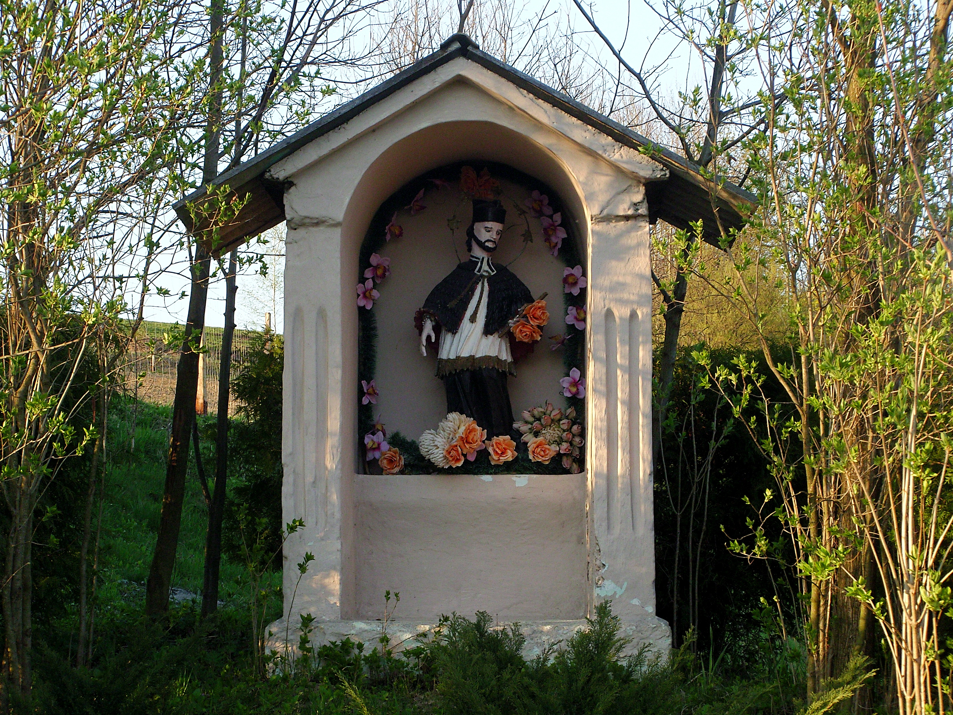 Kapliczka św. Jana Nepomucena z 1860 w Bączalu Dolnym